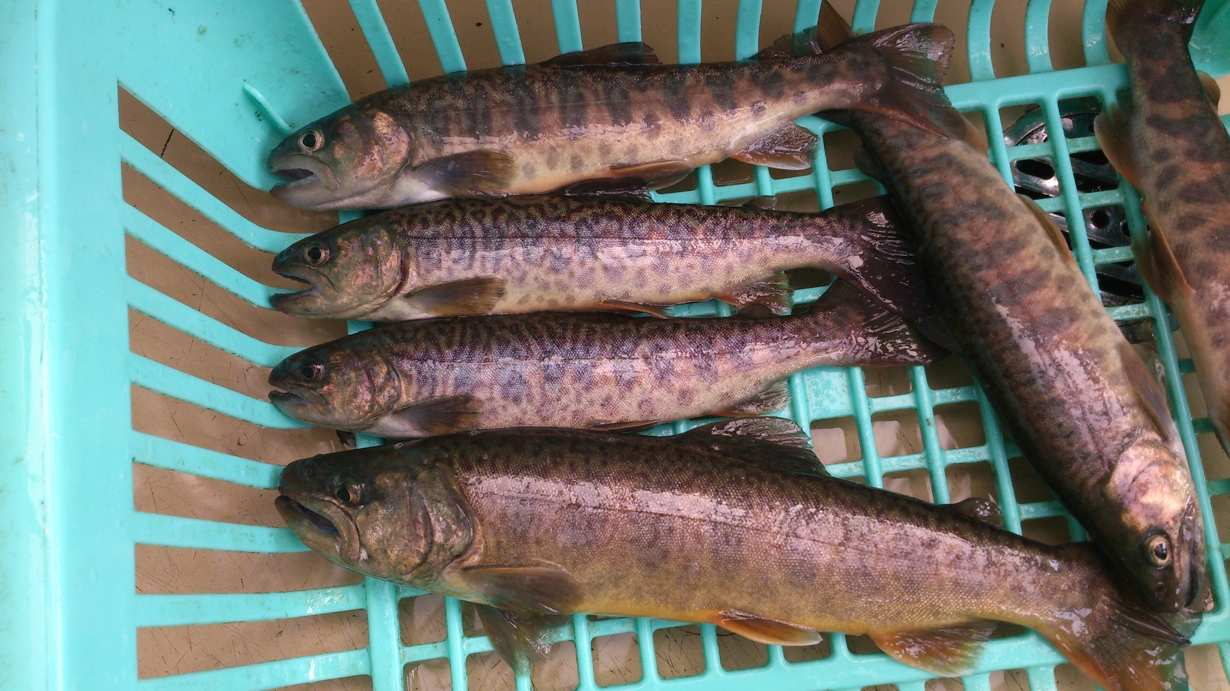 イワナとヤマメの交配種。 管理釣り場にて。